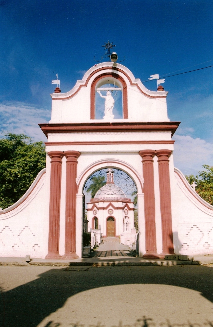 Sector Antiguo de la ciudad de El Cerrito Cerrito